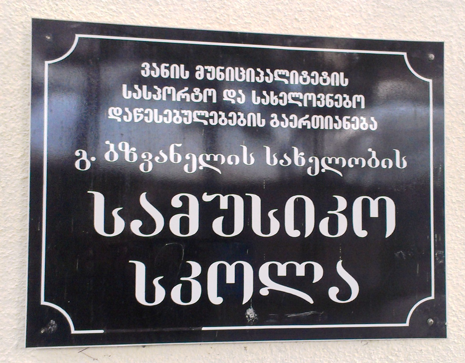 ვანის გურამ ბზვანელის სამუსიკო სკოლის ბანერი